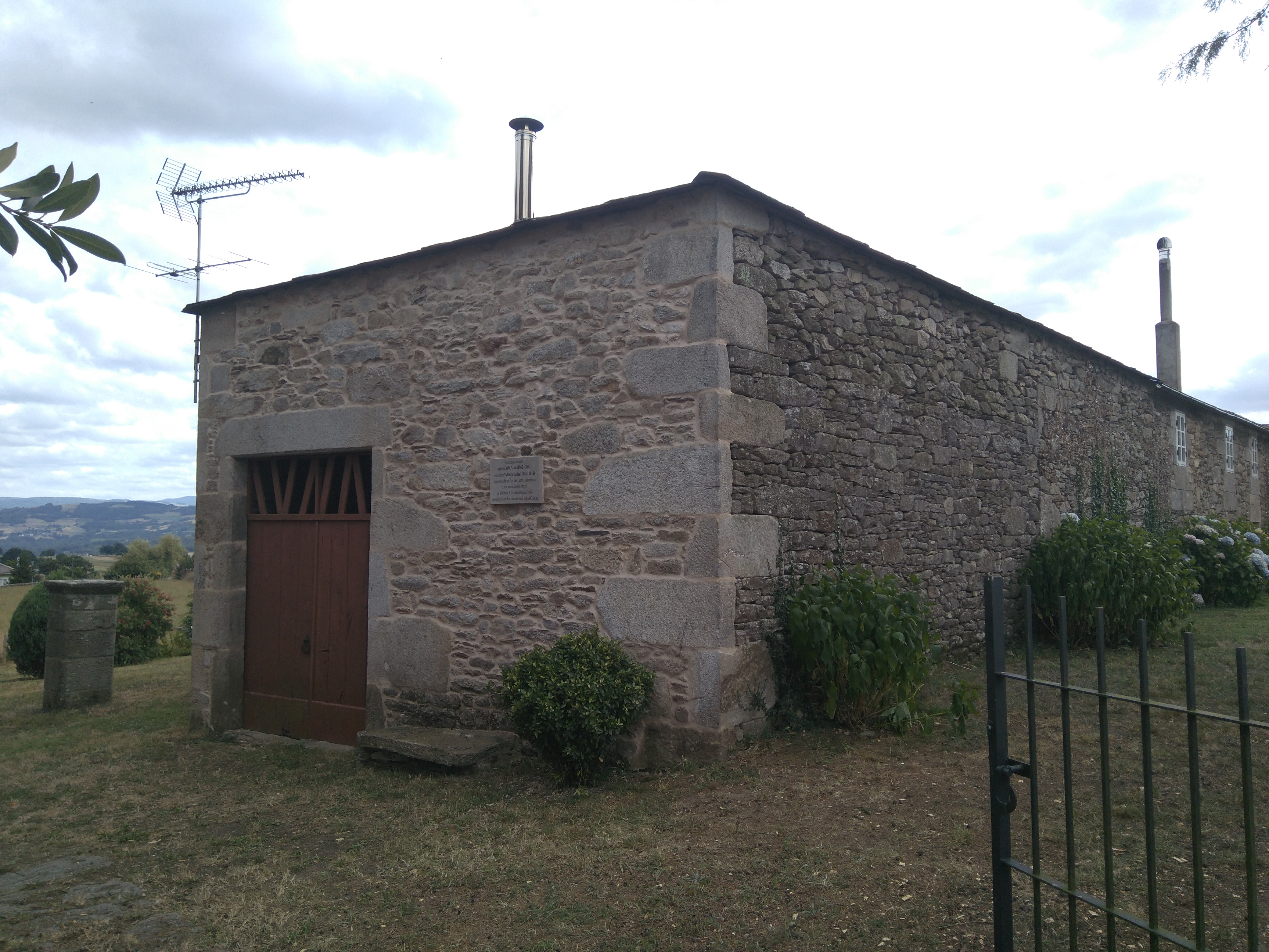 Vivienda en la que habitaron los escritores gallegos Xela Arias y Valentín Arias